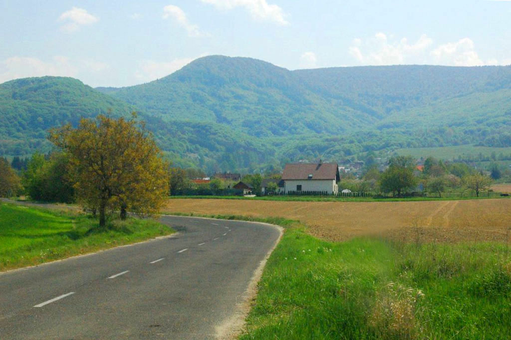 Cígeľ and Mount Tlstý diel, 1014 m